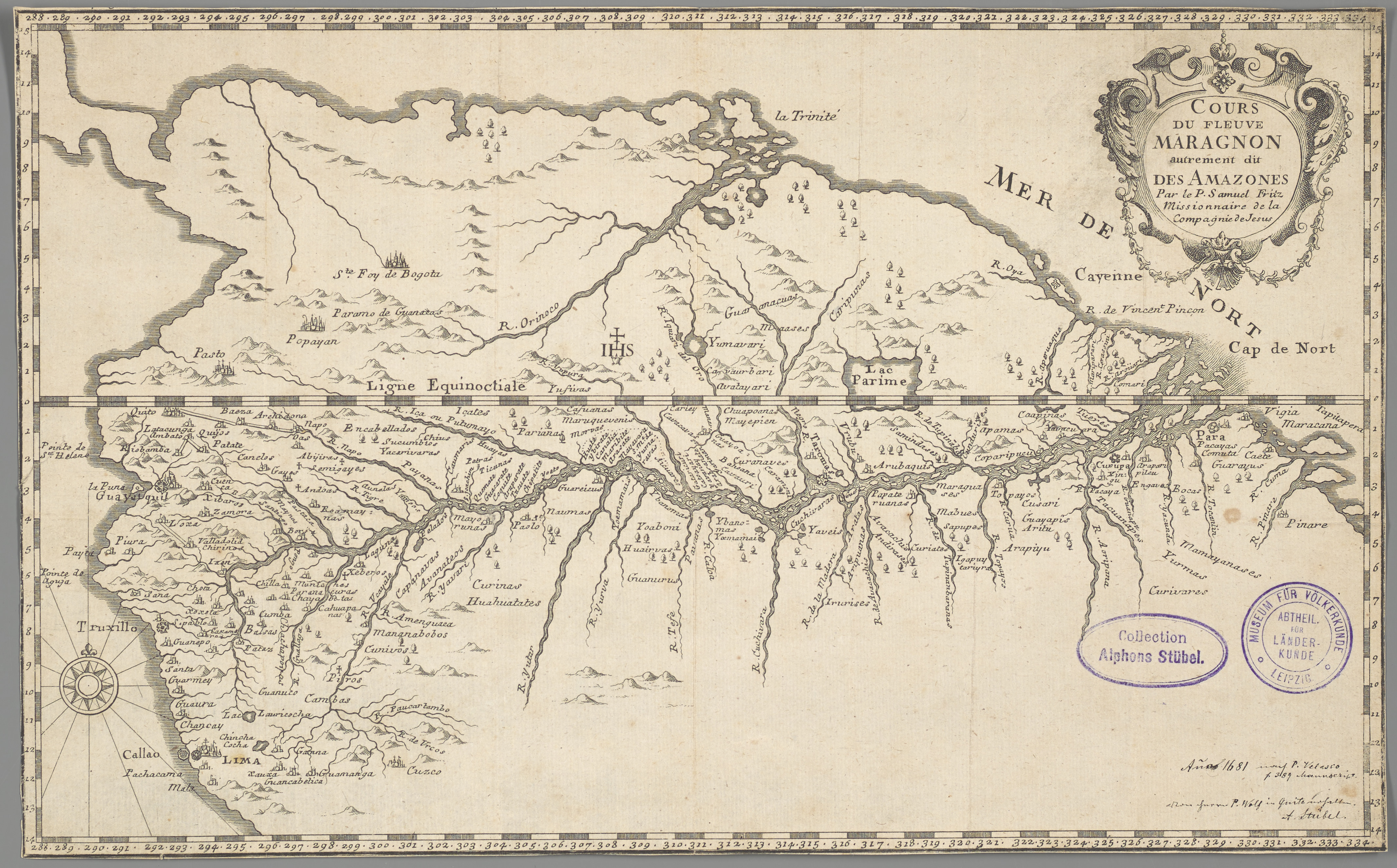 1 Kt. : unkolor. (35 x 22 cm). Koordinaten W 84°05'00"-W 43°42'00"/N 13°18'00"-S 12°39'00". Ohne Maßstab. Titelkartusche oben rechts. Ohne Kt.-Netz. Relief: Einzelberge. Altkarte. Der böhmische Jusuit Samuel Fritz (1654-1728) ging 1684 als Missionar ins Amazonasgebiet. Neben seiner Tätigkeit in der Indianermission (Reduktionen) wurde Fritz zu einem bedeutenden Erforscher Amazoniens. Auf einer zunächst handgezeichneten Karte des Amazonas zeichnete Fritz erstmals den Gesamtlauf des Stroms korrekt ein und erkannte den Marañón als Hauptquellstrom. Die Karte wurde seit 1707 in verschiedenen Versionen und Sprachen gedruckt.